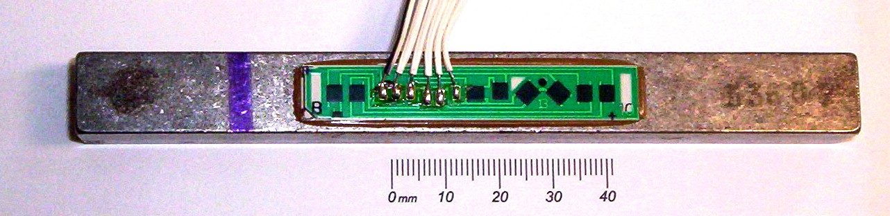 Biegebalken aus einer Personenwaage